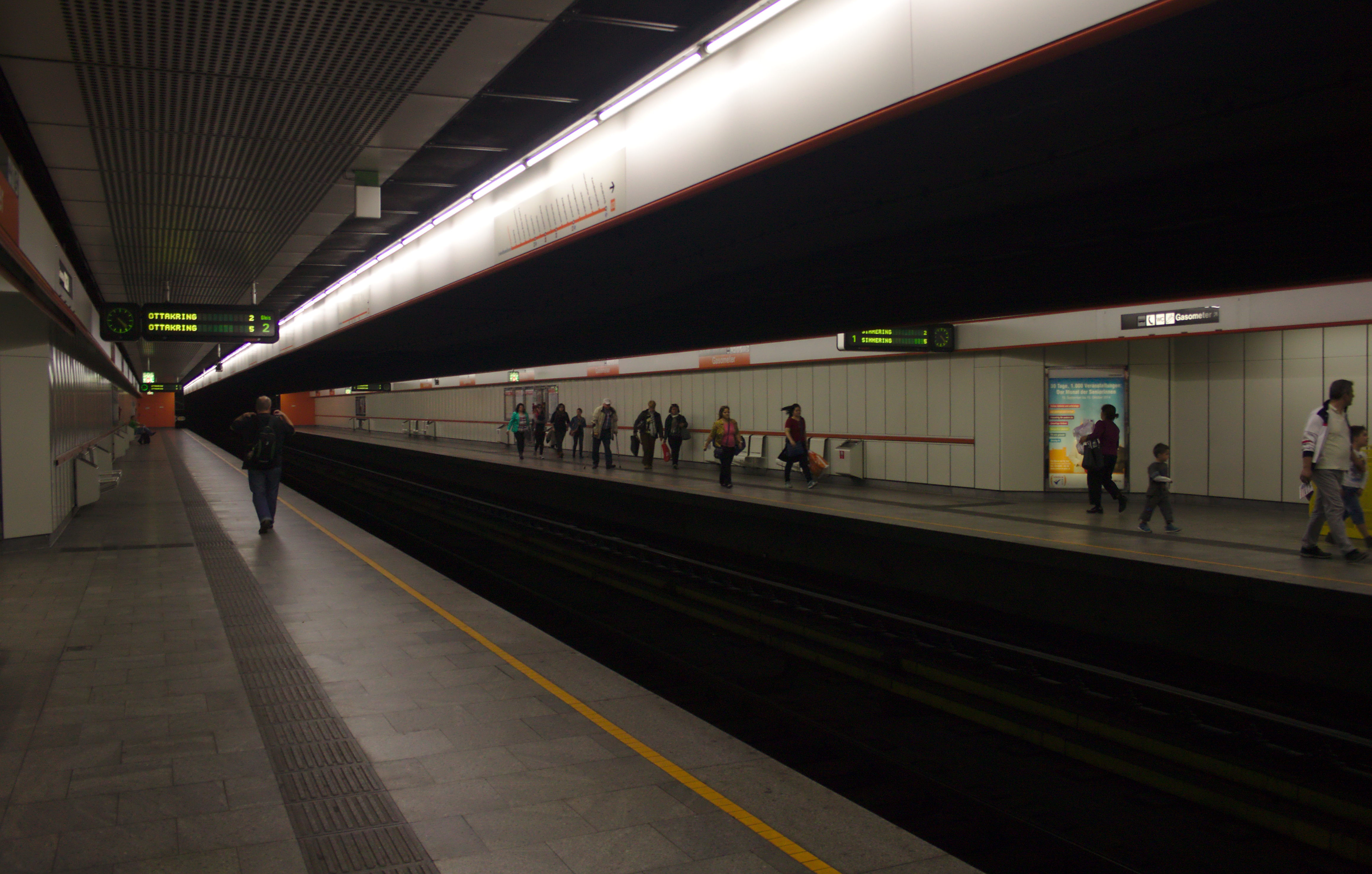 Bahnsteige der U3-Station Gasometer